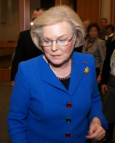 Hanja Maij-Weggen in Boekel, The Netherlands.